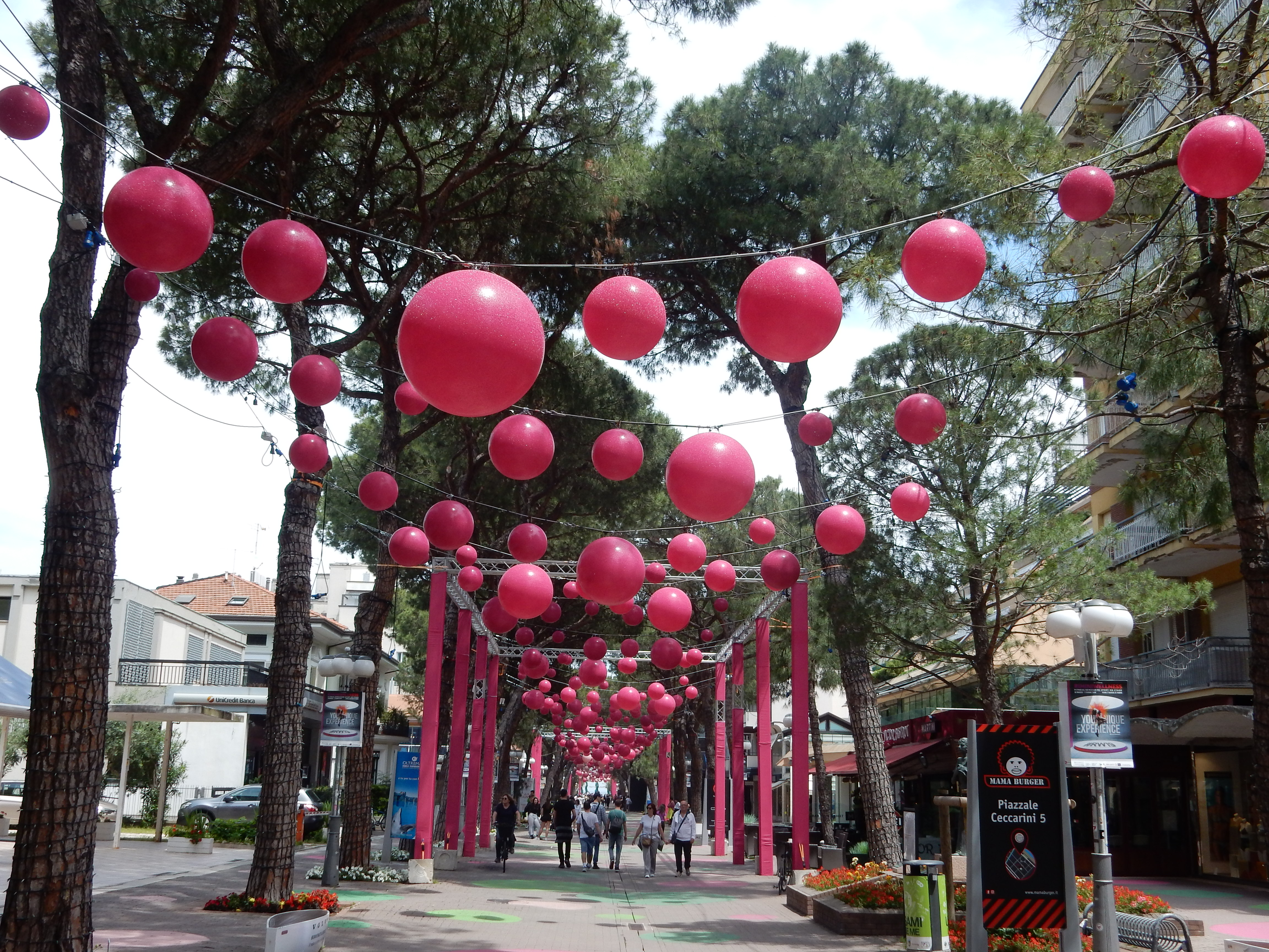 Viale Ceccarini decorato in rosa